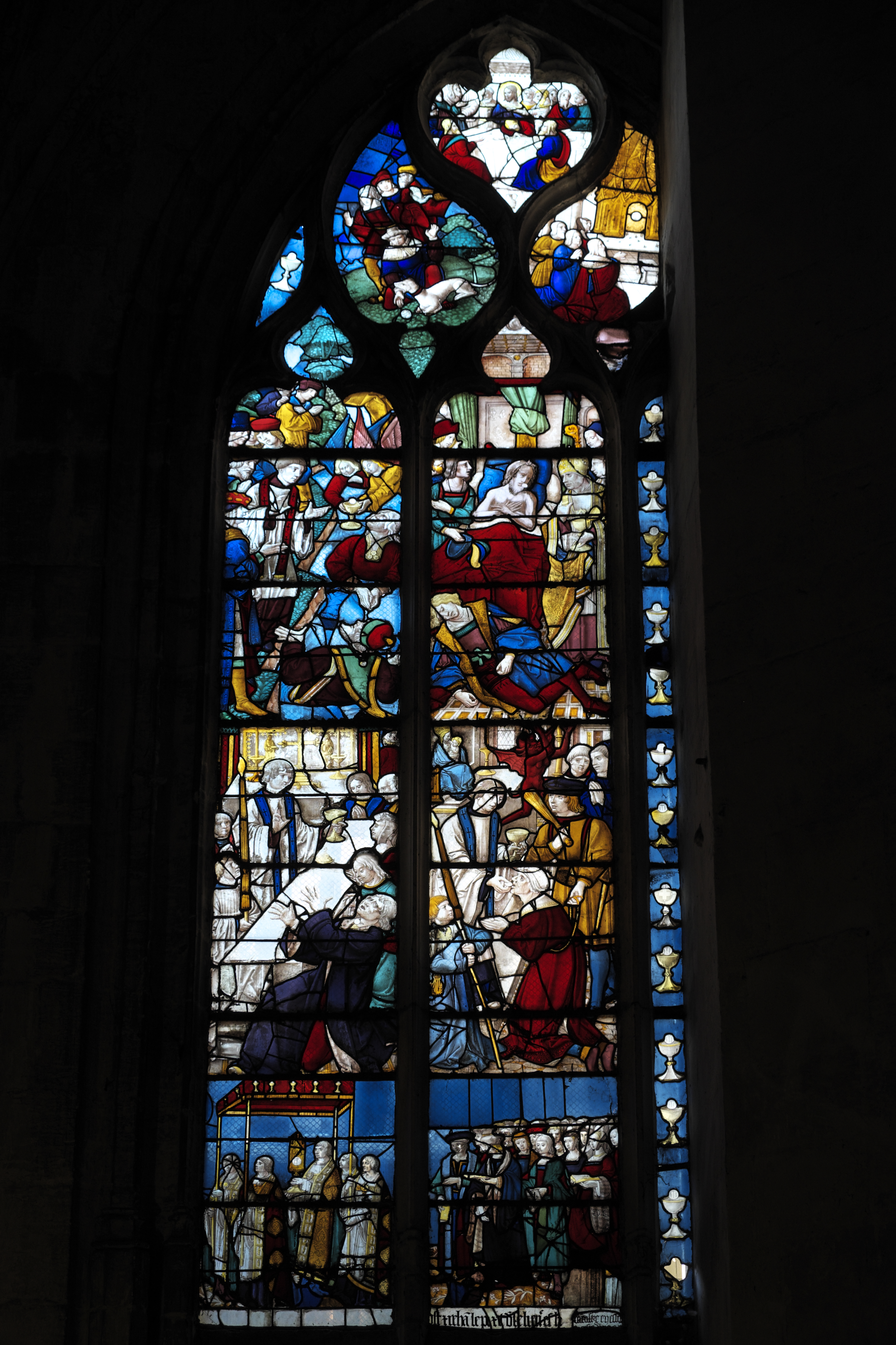 Katholische Kirche Saint-Ouen in Pont-Audemer im Département Eure (Haute-Normandie/Frankreich), Bleiglasfenster aus dem 16. Jahrhundert, Darstellung: Eucharistie